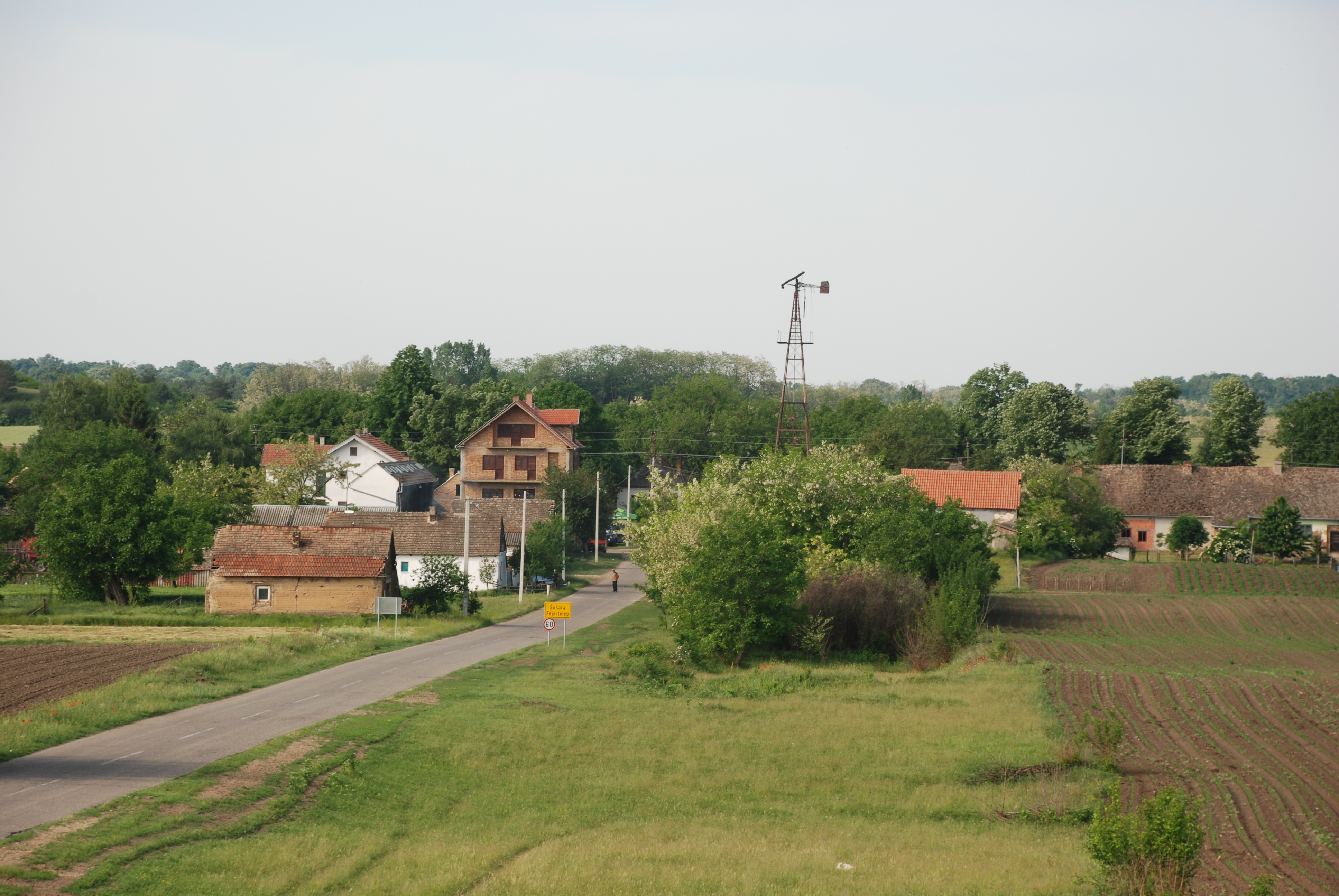 Šušara.KUD 20-ta smotra južno banatckih Mađara. 2009 g.